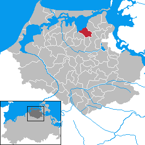 Neu Bartelshagen in Mecklenburg-Vorpommern - District Nordvorpommern